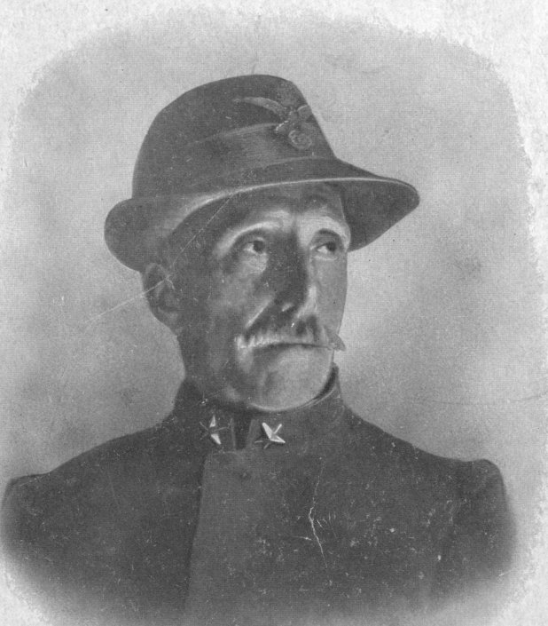 Der italienische Politiker Leonida Bissolati (1857-1920)